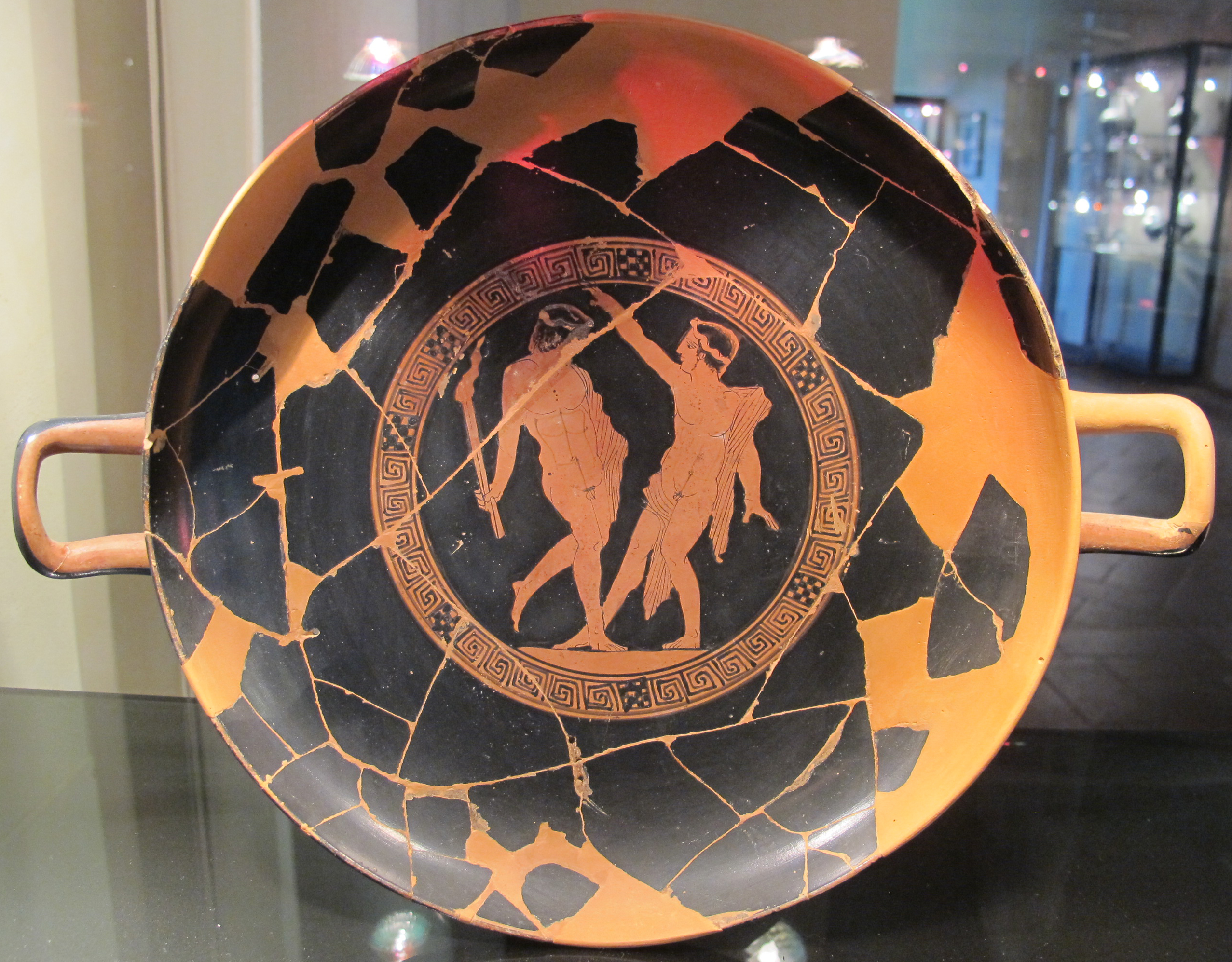 Museo Archeologico Nazionale G.C.Mecenate - MIBAC This is a photo of a monument which is part of cultural heritage of Italy.